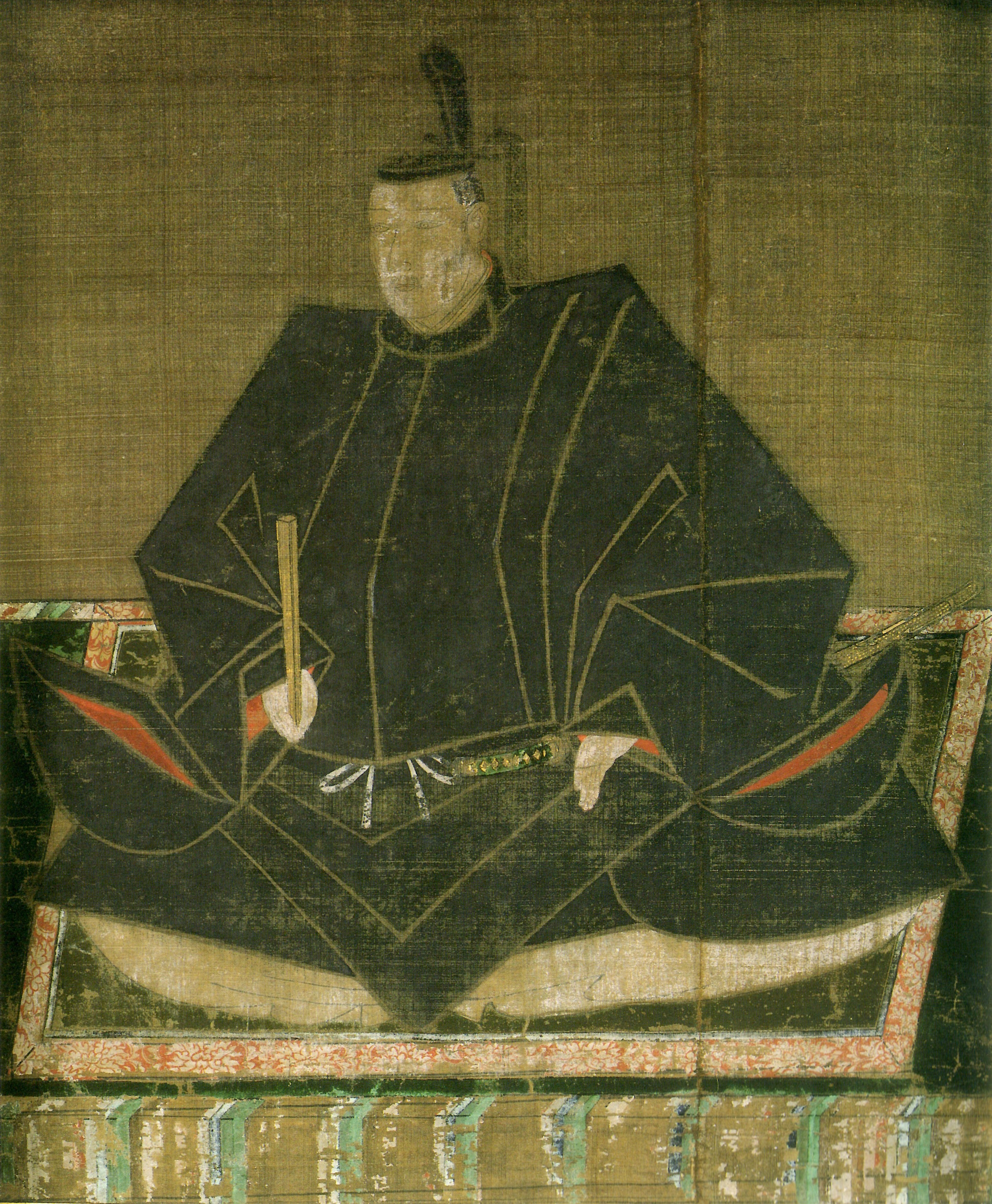 松平忠吉(徳川家康の四男)の肖像。